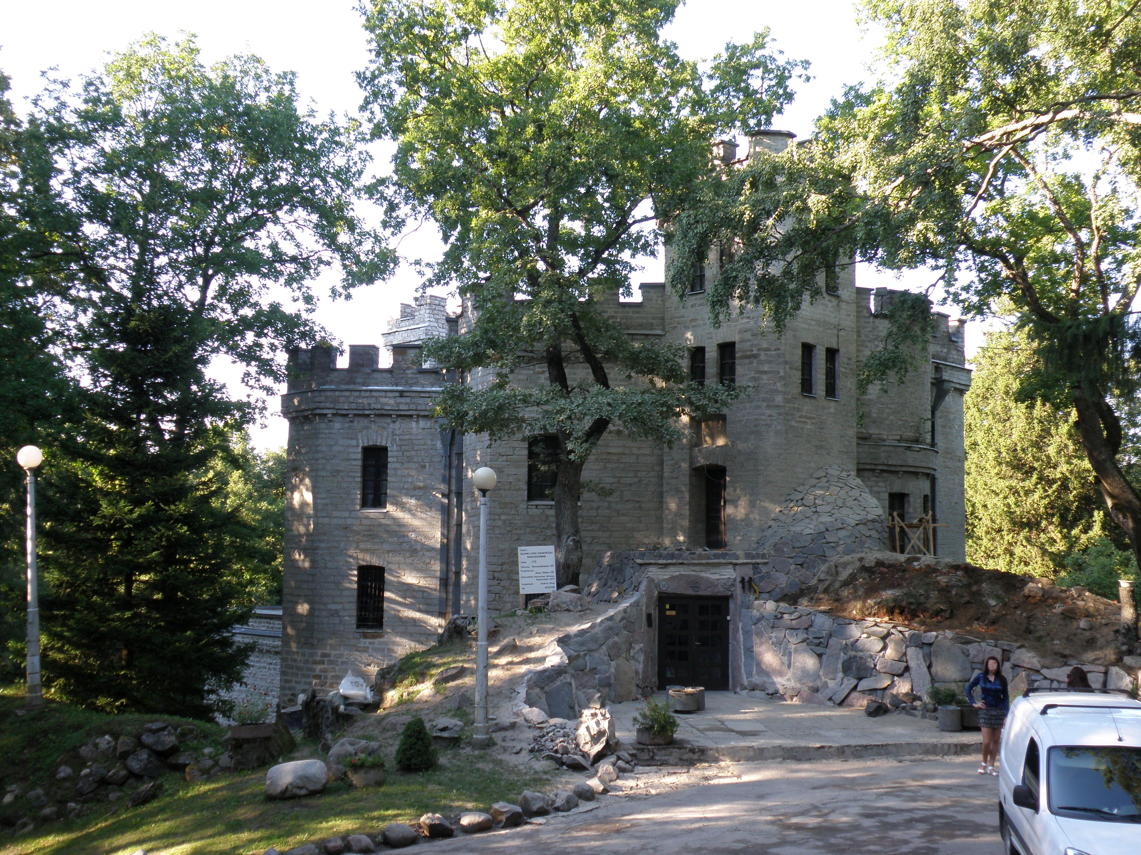 Hohenhaupti loss